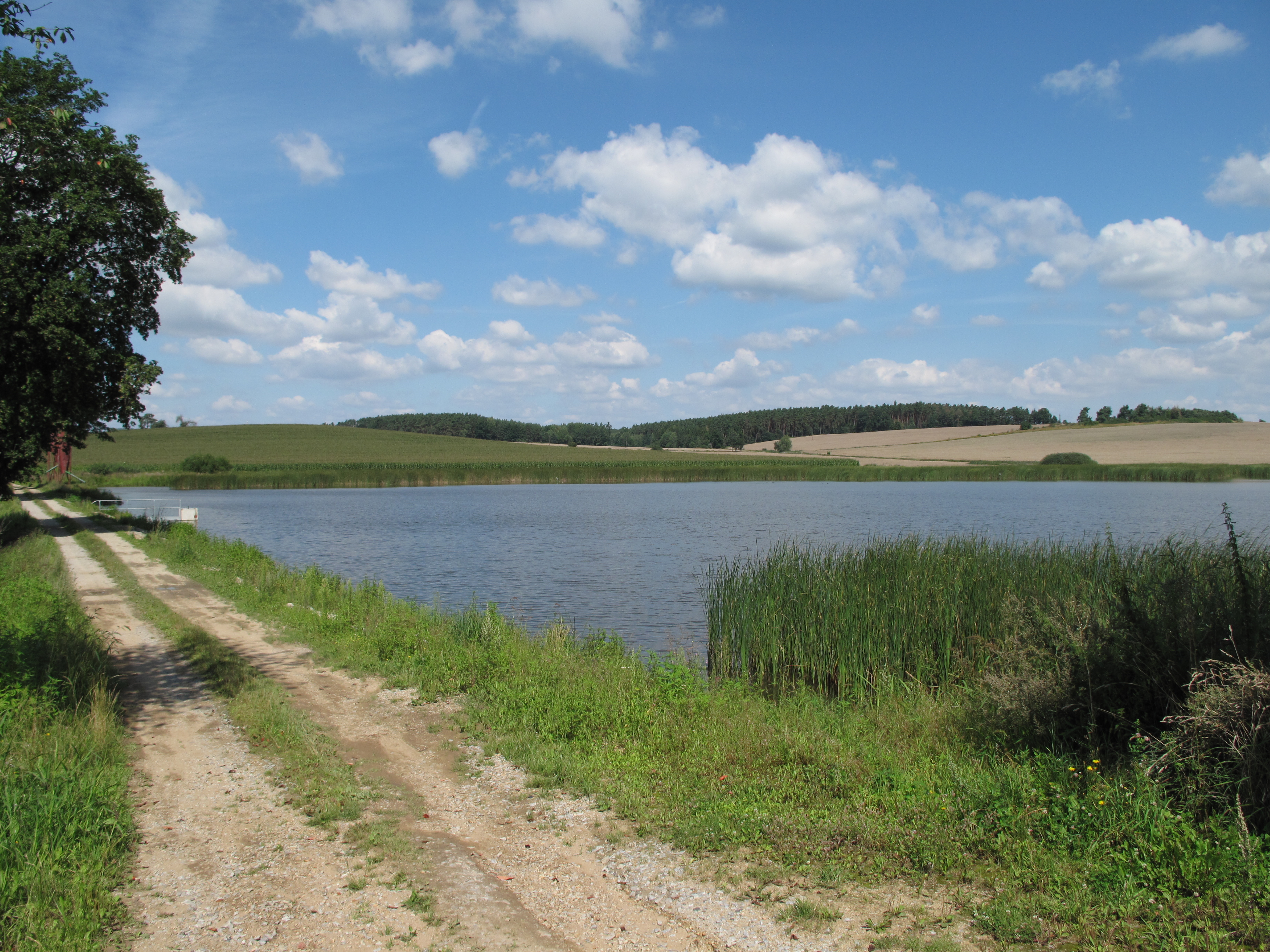 Topělecký rybník. Písek, Česká republika.